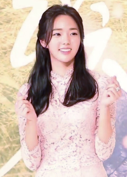 (TV10)왕이 되고 싶었던 박보검!